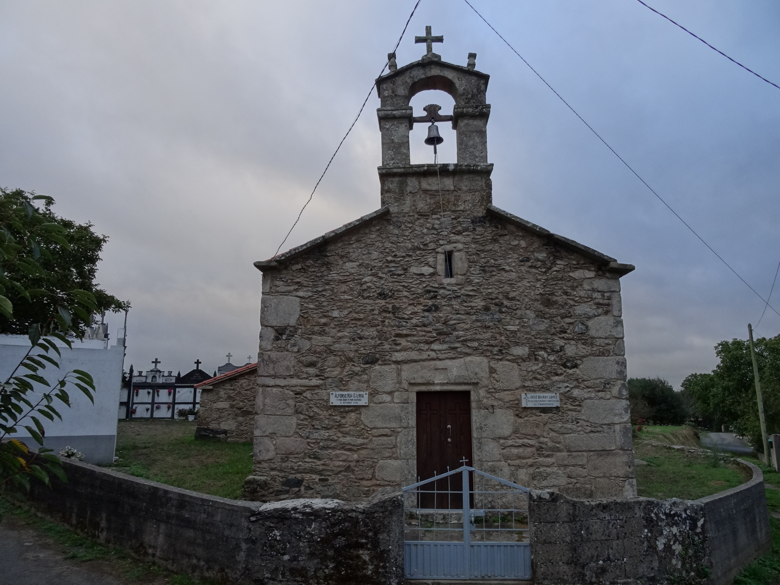 Igrexa da parroquia de Santiso no concello de Santiso, provincia da Coruña